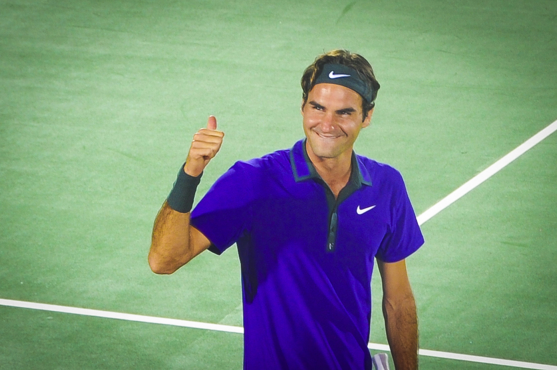 Tigre fue una fiesta. La presentación de Roger Federer y Juan Martín del Potro en la ciudad ante más de 40.000 personas en sus dos exhibiciones quedará en la historia grande del deporte de nuestro país. En el primero de los duelos, se impuso el argentino. En el segundo, el suizo. Aunque el gran ganador fue el público, que ovacionó a los tenistas, en especial al suizo, el mejor de la historia.